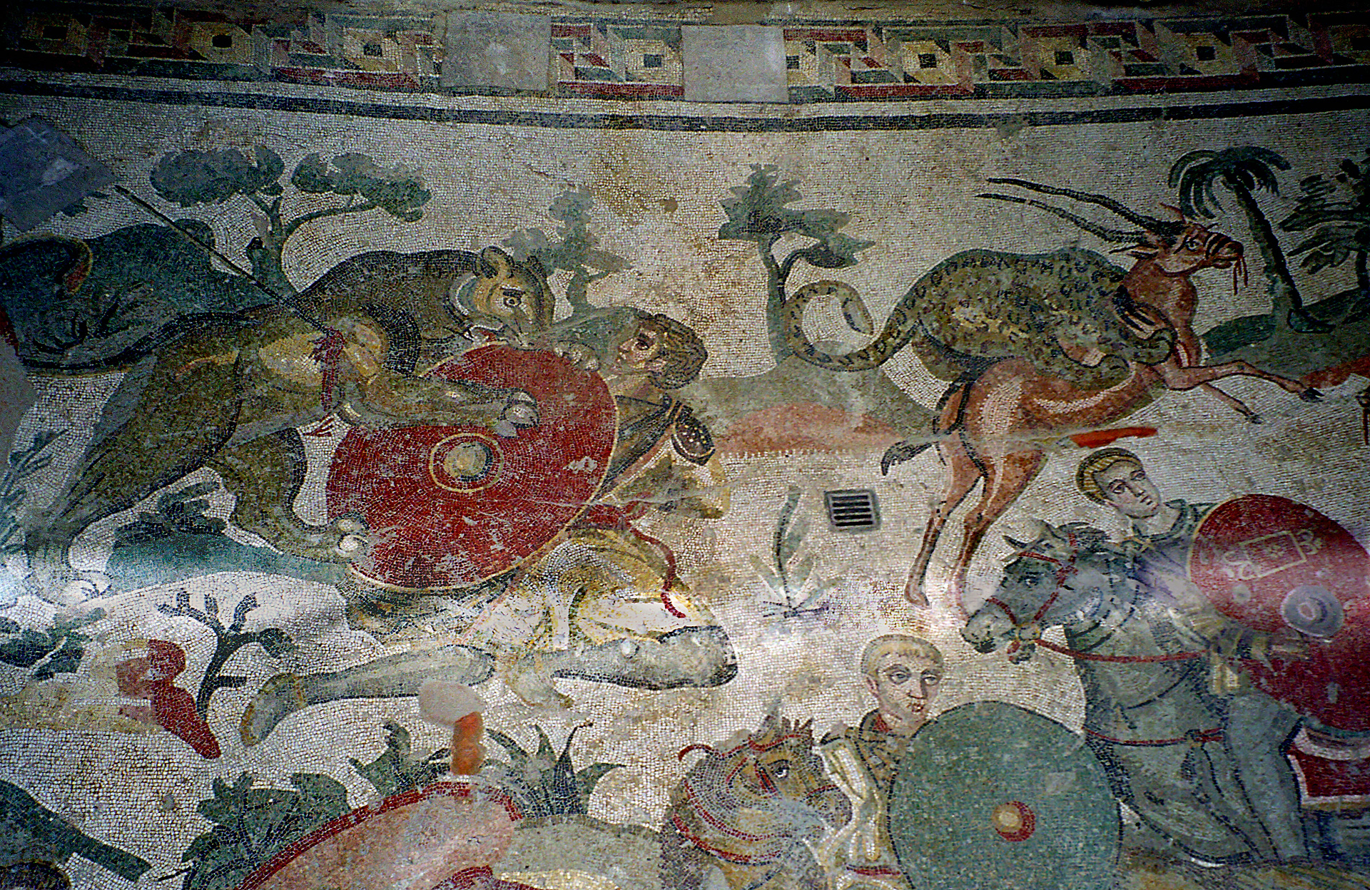 Sicily, Villa Romana del Casale, mozaika "Wielka scena myśliwska" - fragment